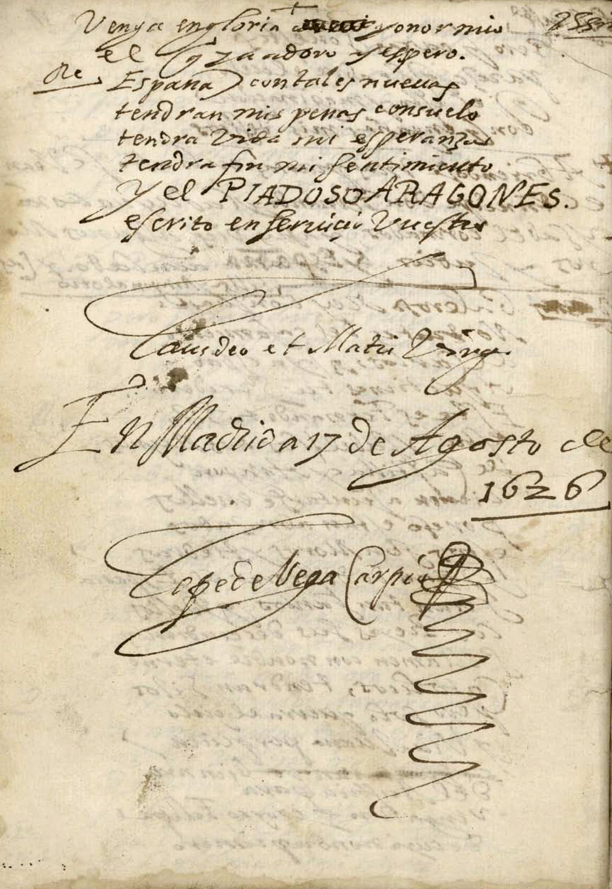 Colofón del autógrafo de Lope de Vega, El piadoso aragonés tragicomedia. Ínc.: Tanta descompostura Vuestra Alteza (h. 1)... Exp.: escrito en servicio vuestro (h. 58), f1r, 17 de agosto de 1626. Mss/15086. Referencia: Ficha BDH Catálogo BNE Leyenda "En Madrid a 17 de Agosto de 1626 [Firmado:] Lope de Vega Carpio"